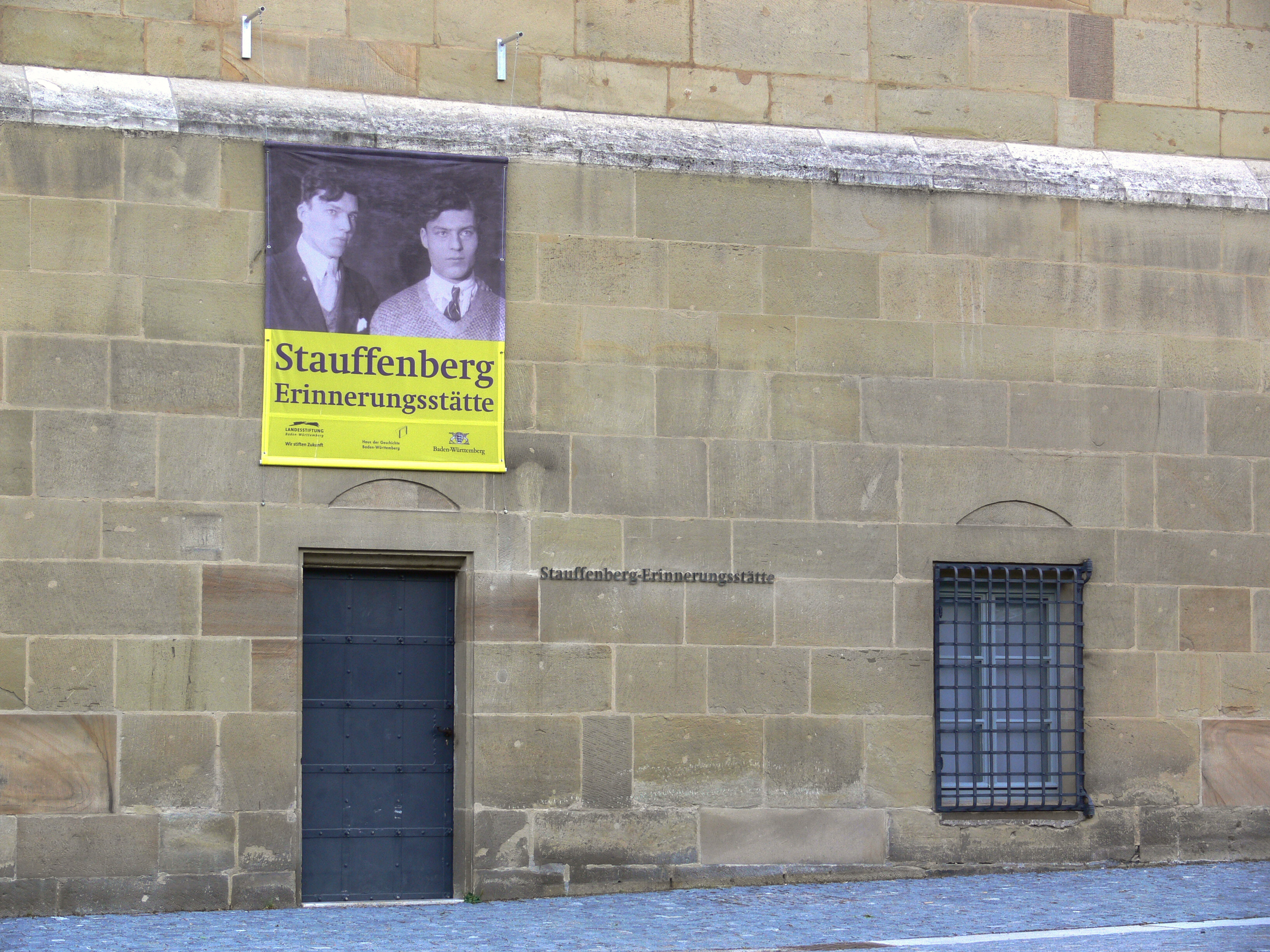 Stuttgart. Stauffenberg-Erinnerungsstätte im Alten Schloss.